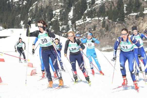 See Title